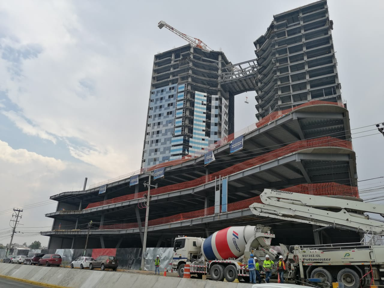 Vía Dorada en construcción junio 2019